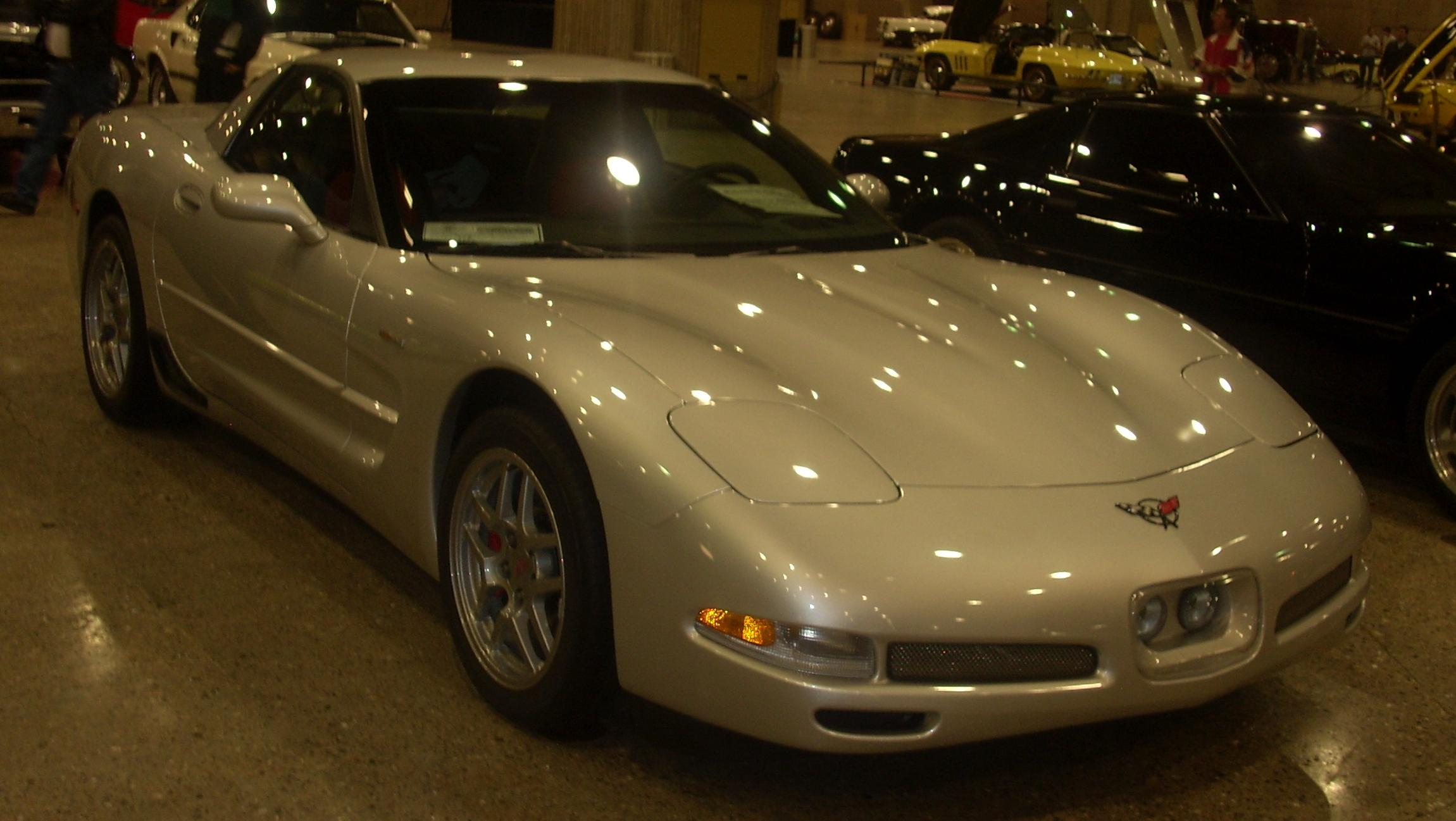 2002 Chevrolet Corvette photographed at Auto classique Montréal 2008.